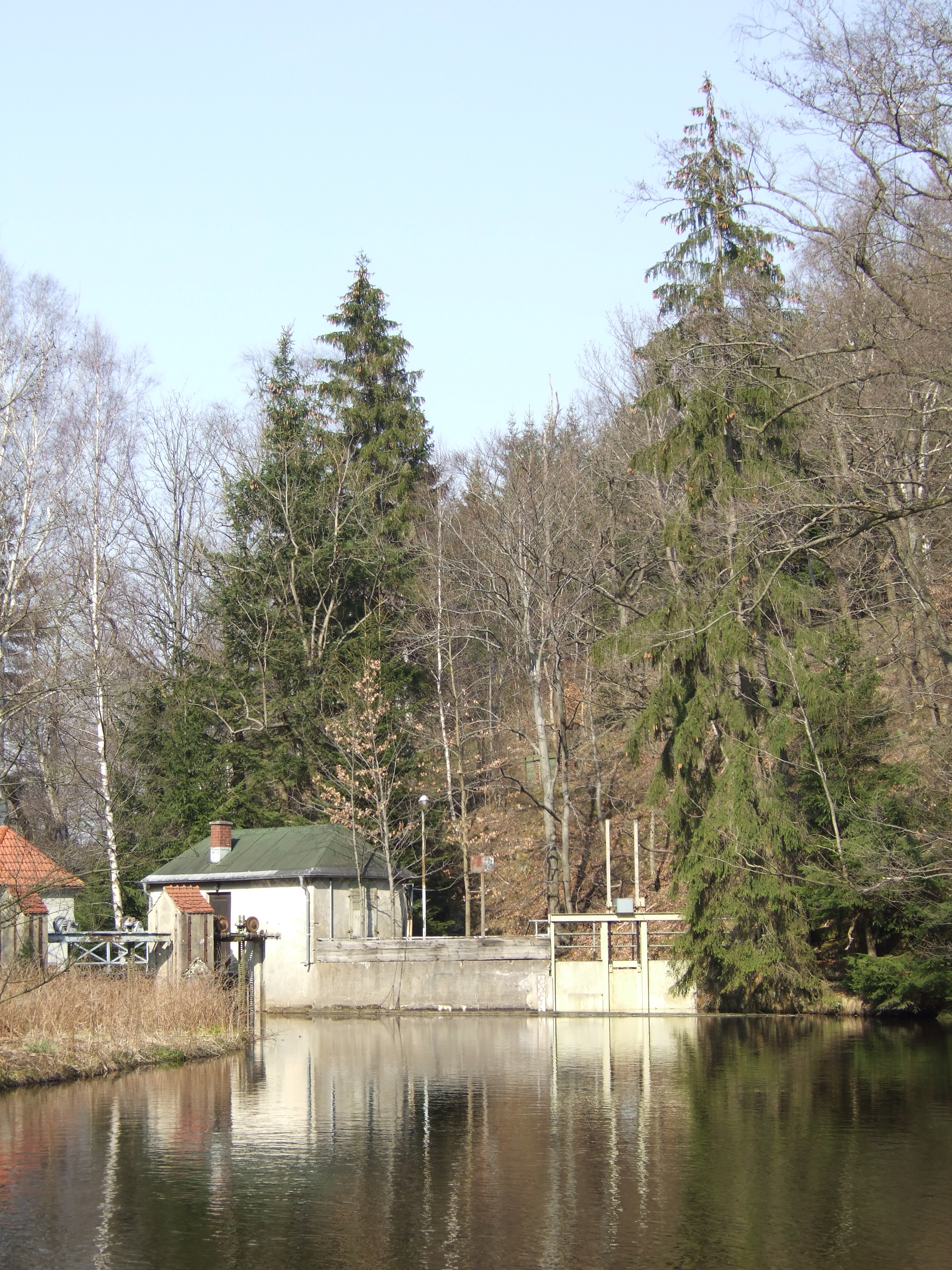 Oker Wehr am südlichen Ende des Ortes Oker